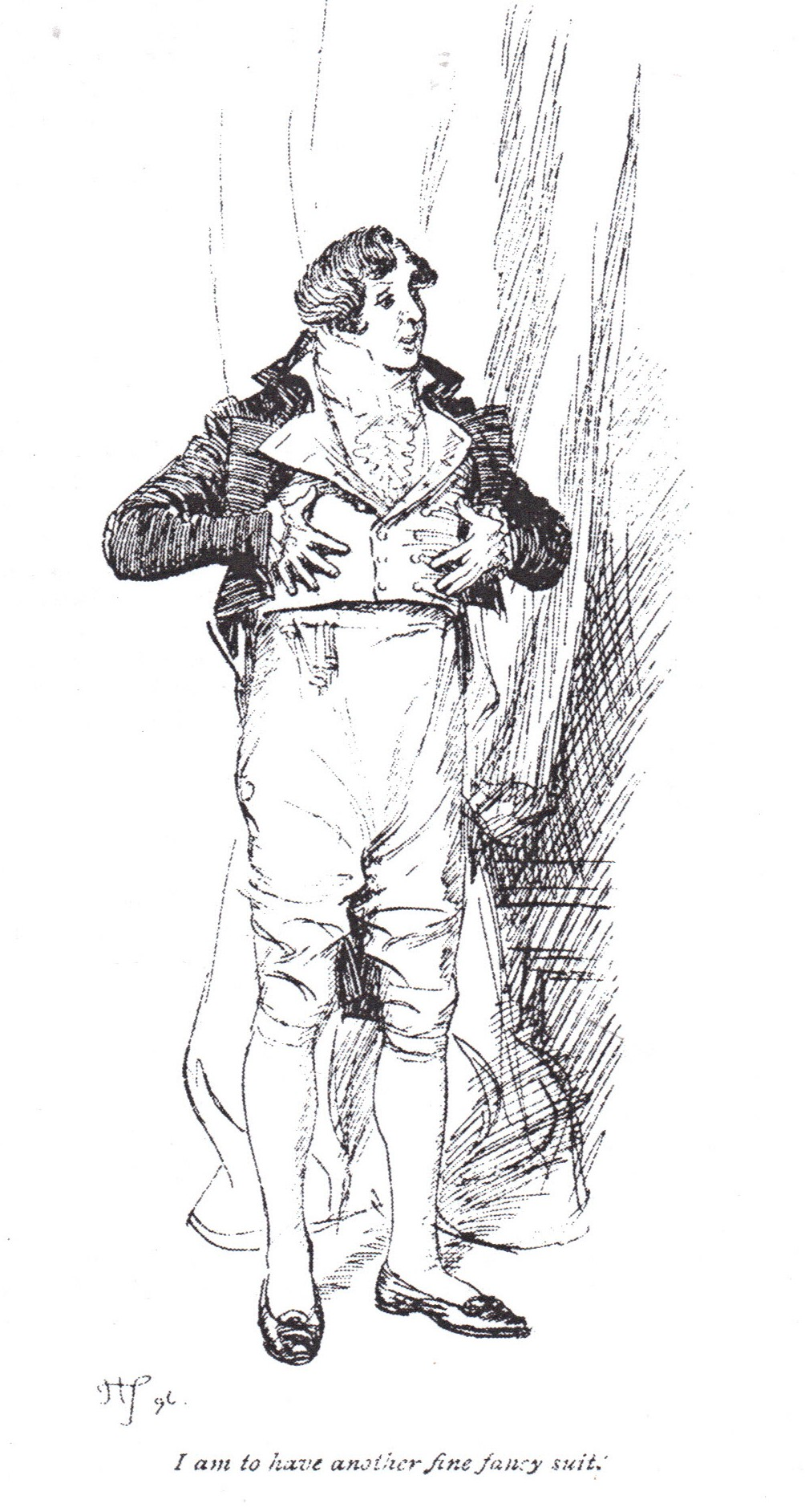 Mansfield Park, ch 14 : le balourd James Rushworth ne voit, dans le rôle théâtral qu'on lui attribue, que le plaisir d'avoir un joli costume.